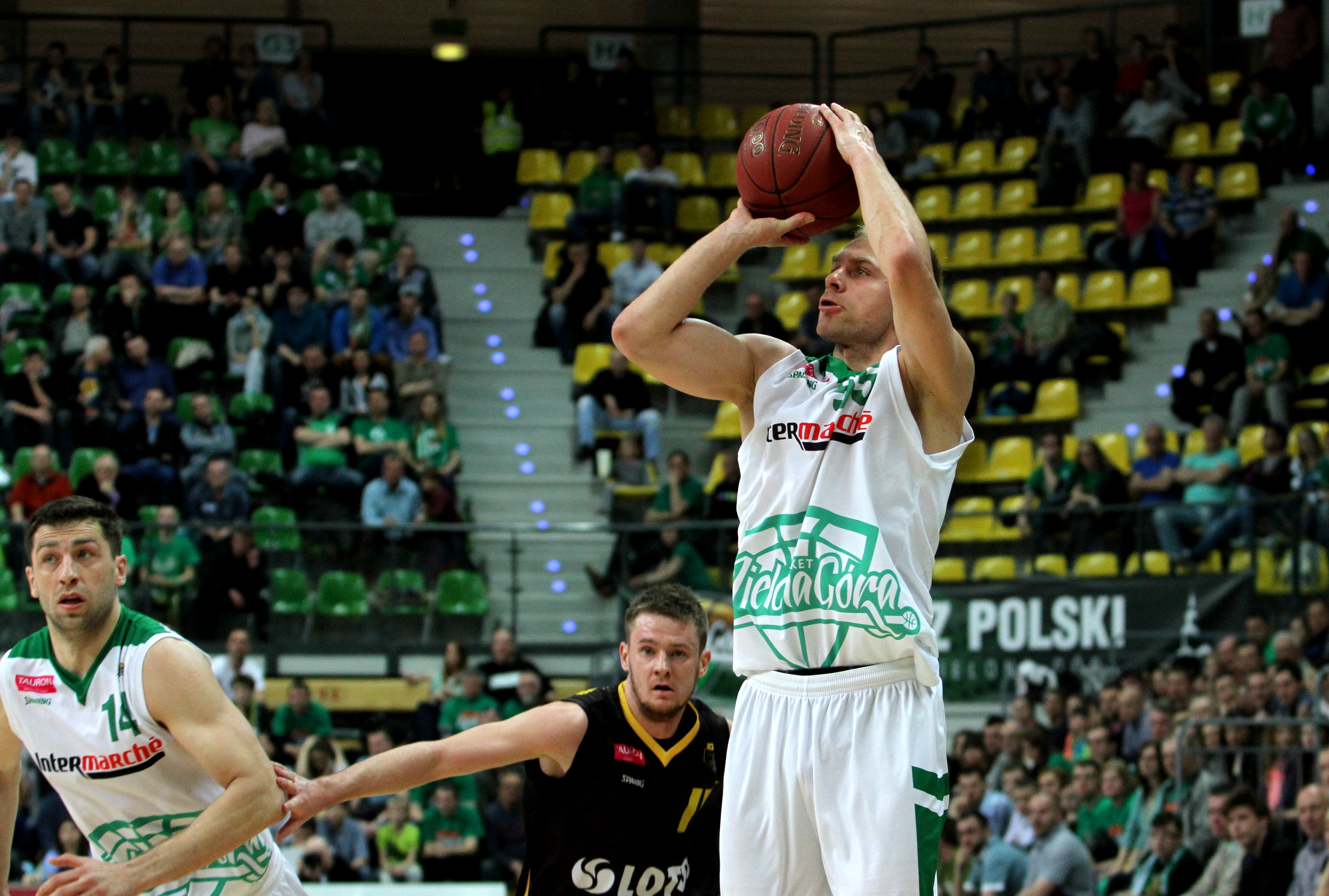 Łukasz Koszarek Stelmet Zielona Góra